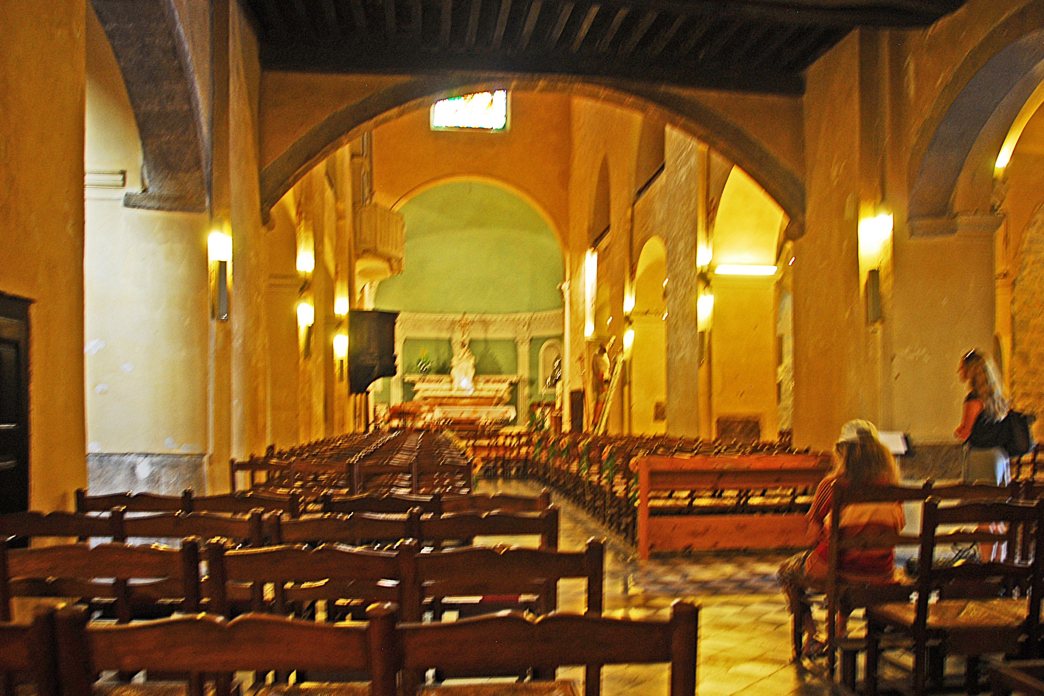 Kathedrale von Vence, Mittelschiff unter Empore